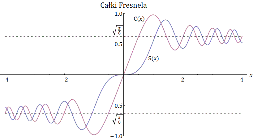 Fresnel integrals.